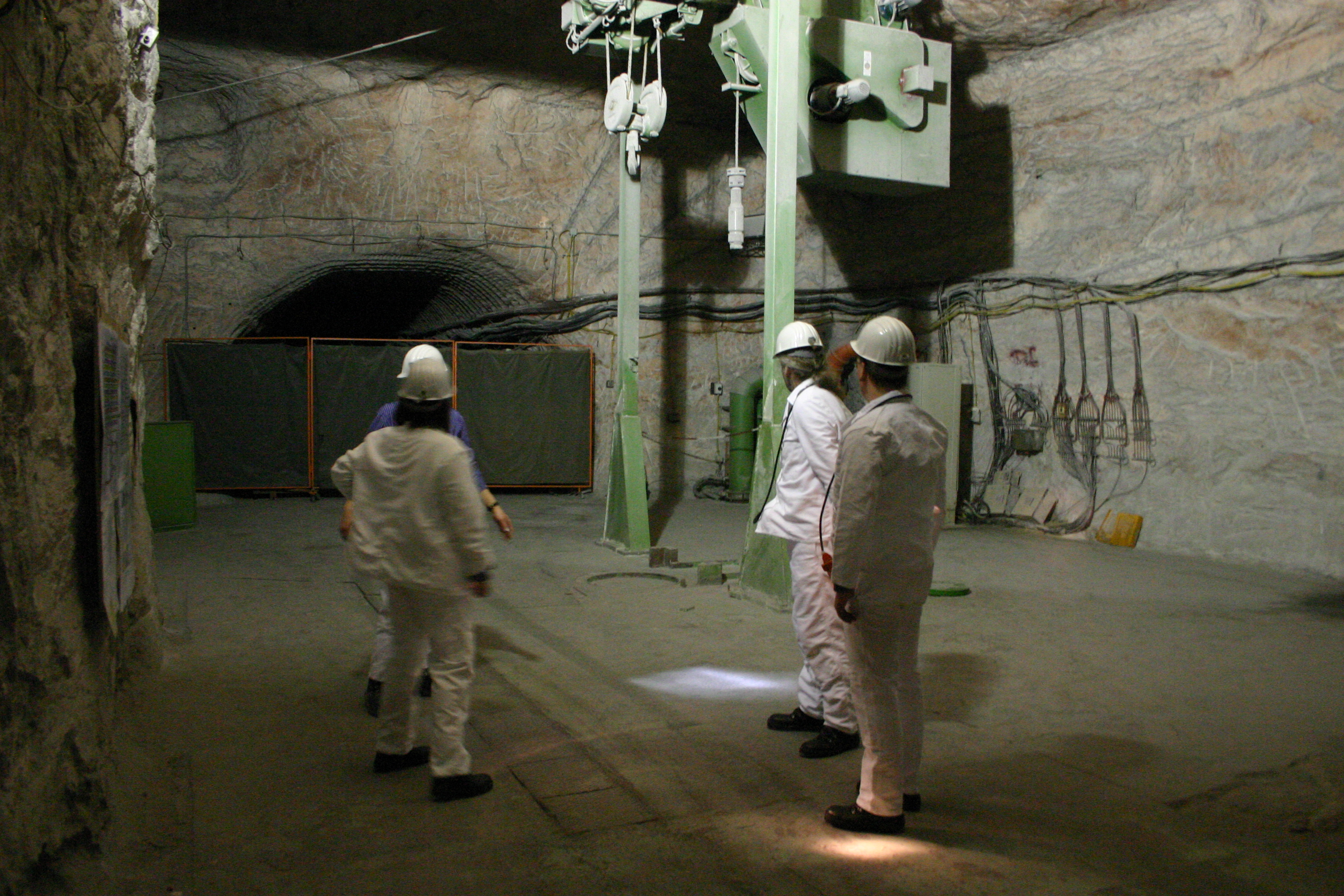 Zufuhrkammer für mittelaktiven Abfall, ca. 20 m über der Einlagerungskammer 8a